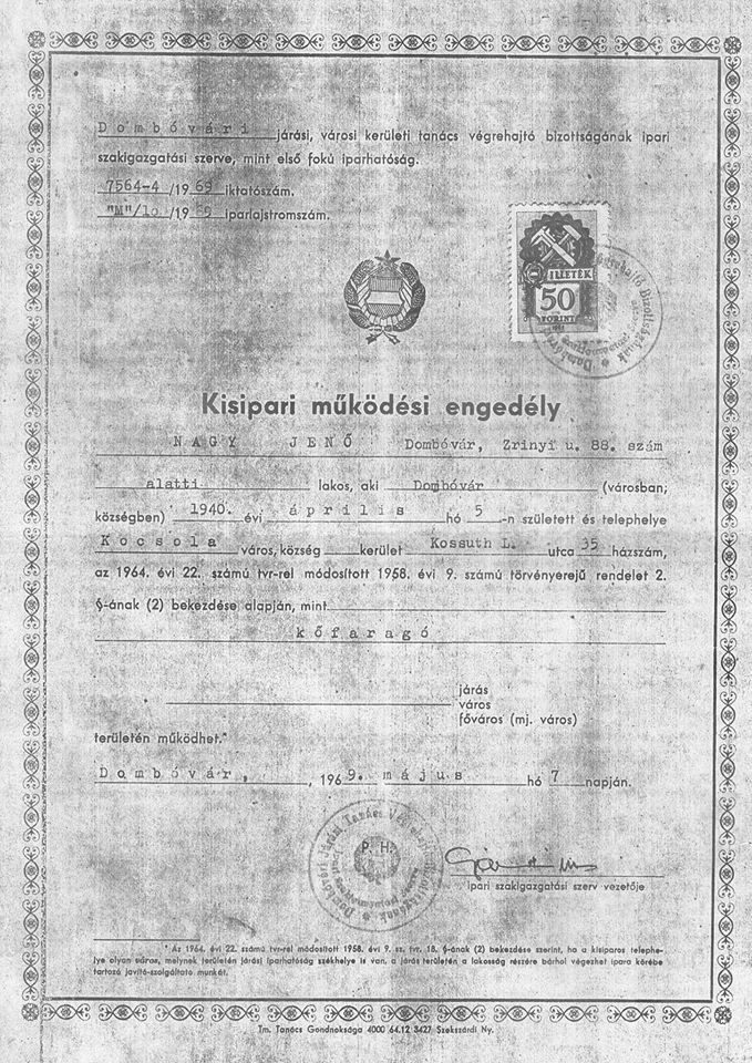 Nagy Jenő (Újdombóvár, 1940. 05. 04) dombóvári kőfaragó 1969. 05. 08-án indította vállalkozását